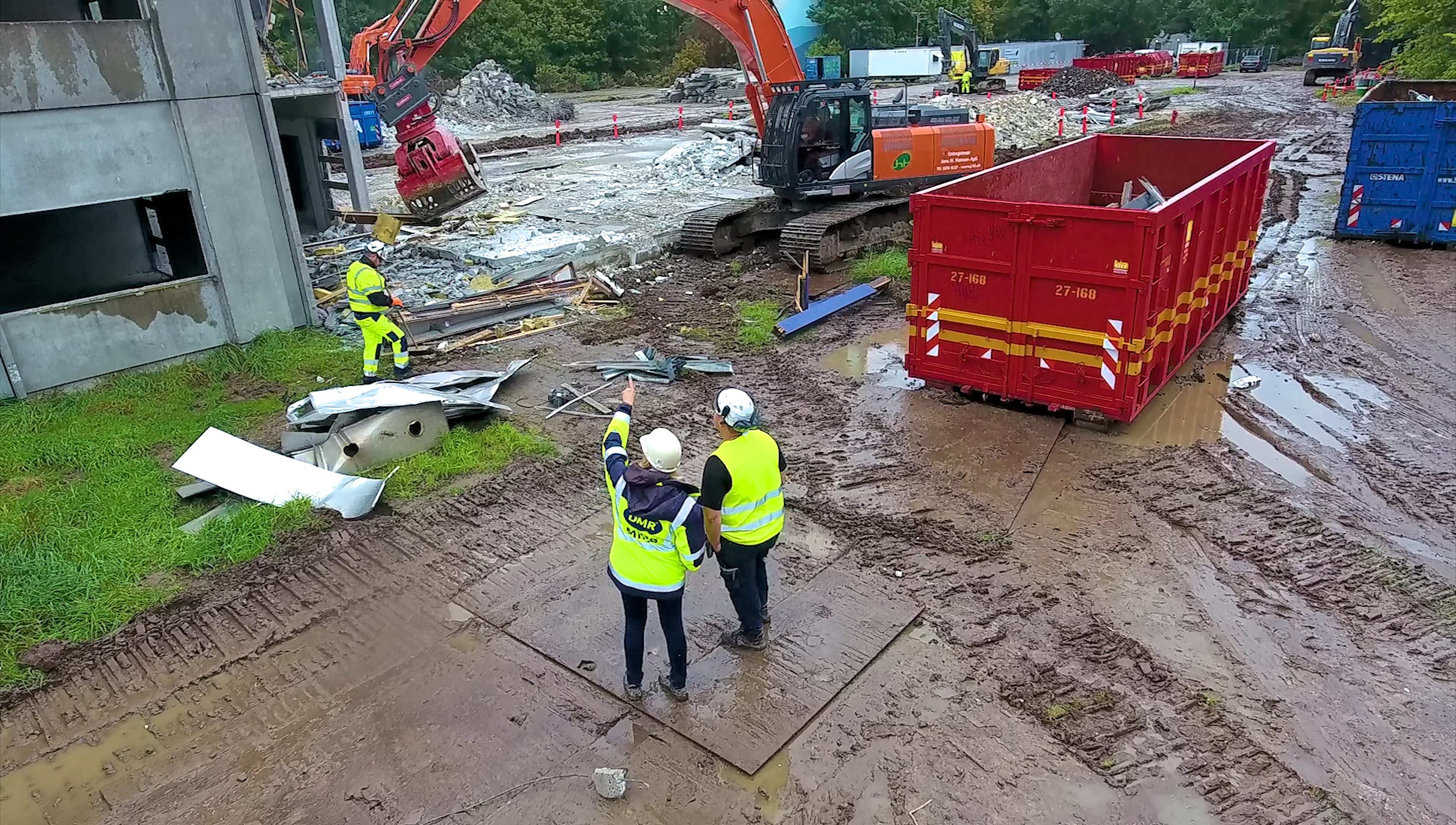 Foto af nedrivning og klargøring af byggeprojekt